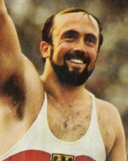 SPORT VEDETTES-PANINI 1974-Figurina n.32- WOLFERMANN- BRD -ATLETICA LEGGERA-Rec